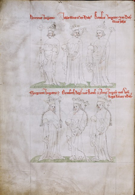 Lucemburská dynastie